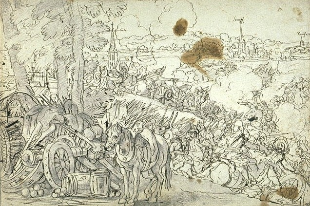 Bataille de Seneffe. Dessin à l'encre brune, la pierre noire et la plume.